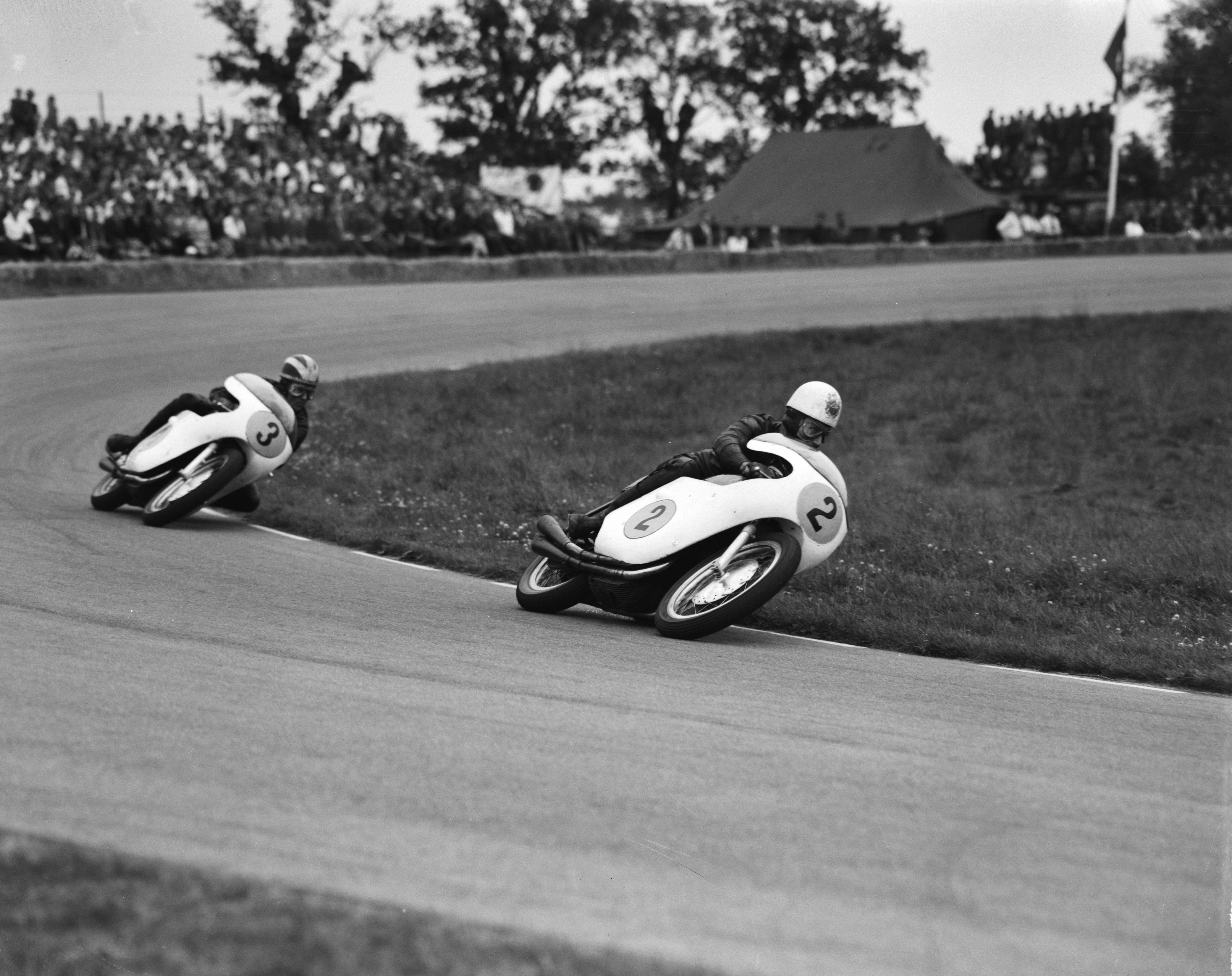 Collectie / Archief : Fotocollectie Anefo Reportage / Serie : TT Assen 1963 Beschrijving : TT te Assen. De 500cc klasse. John Hartle (op kop), daarachter Phil Read Datum : 29 juni 1963 Locatie : Assen Trefwoorden : motoren, motorsport, races Persoonsnaam : Read, Phil Fotograaf : Bilsen, Joop van / Anefo Auteursrechthebbende : Nationaal Archief Materiaalsoort : Negatief (zwart/wit) Nummer archiefinventaris : bekijk toegang 2.24.01.04 Bestanddeelnummer : 915-3145